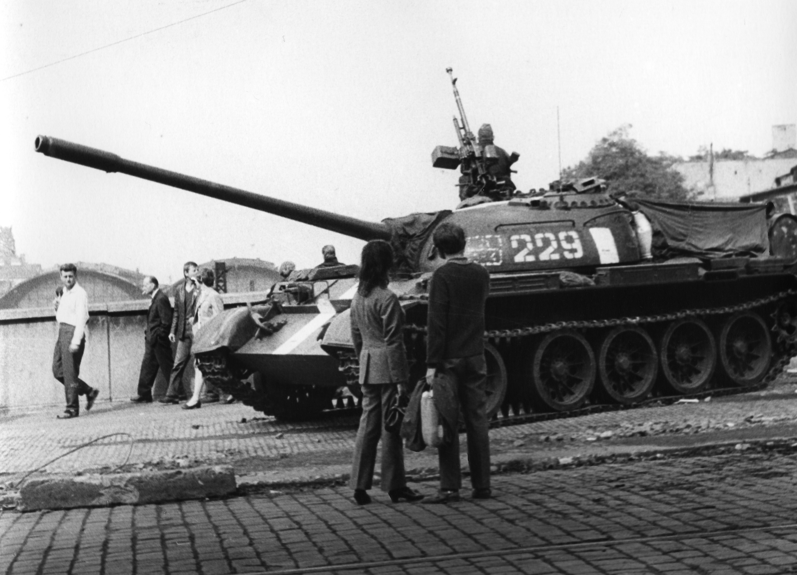 Fotografie ze dne okupace Československa v roce 1968